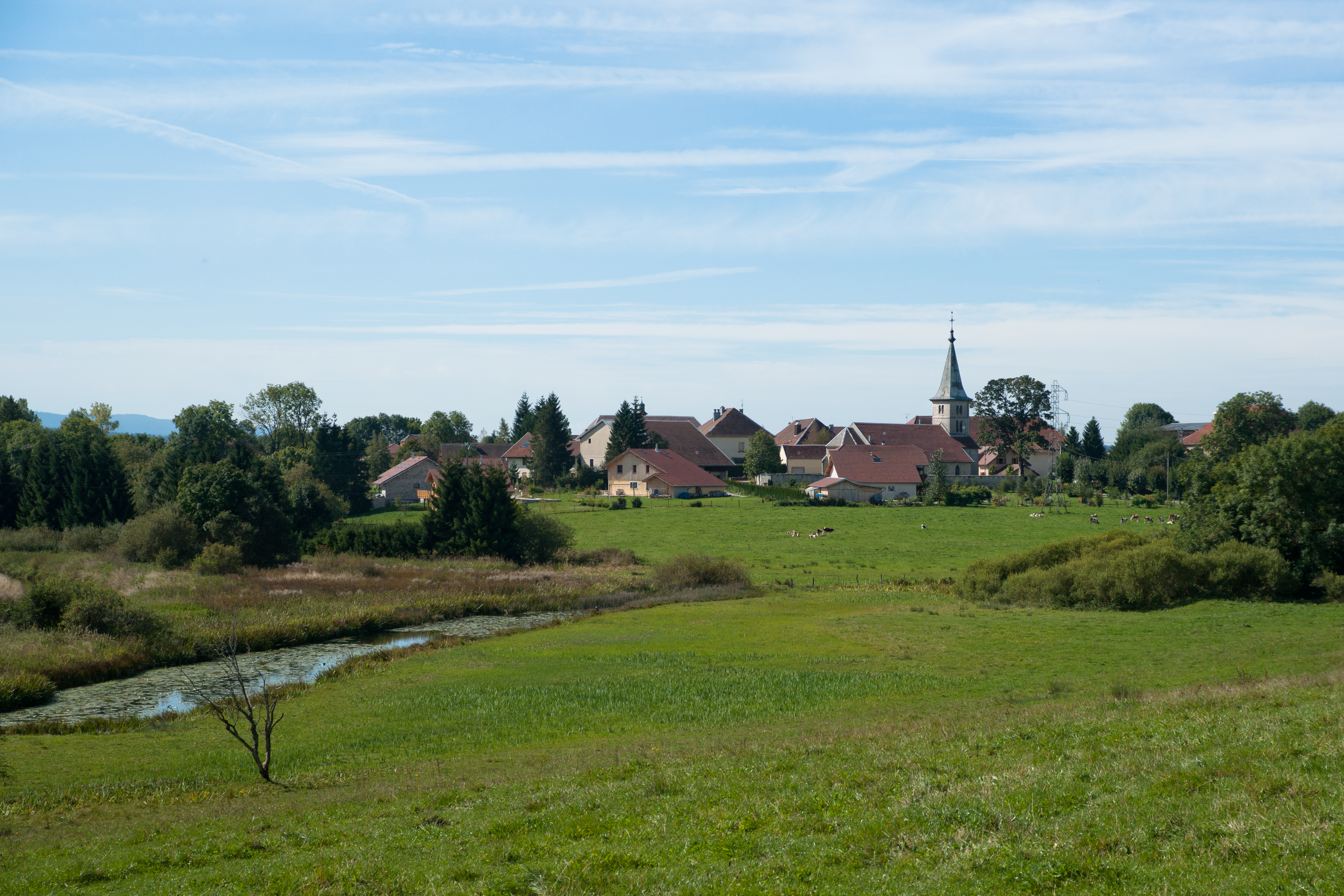 Bouverans